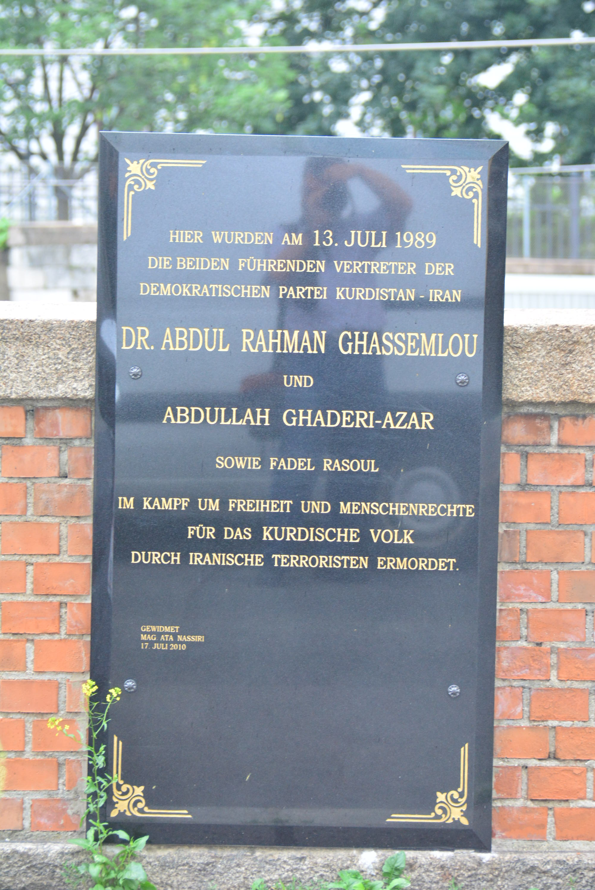 Gedenktafel für Abdul Rahman Ghassemlou, Abdullah Ghaderi-Azar undFadhil Rassoul (Wien, gegenüber Linke Bahngasse 5)